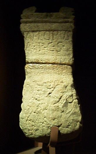 Imagen del ara votiva de Rasines, corresponde con la inscripción HEp 10, 154 = HEp 13, 267, cuyo texto dice: M(?) FLORVS/ M(emoria) P(osuit) C(oniugi) S(uae) Imagen del ara votiva romana de Rasines